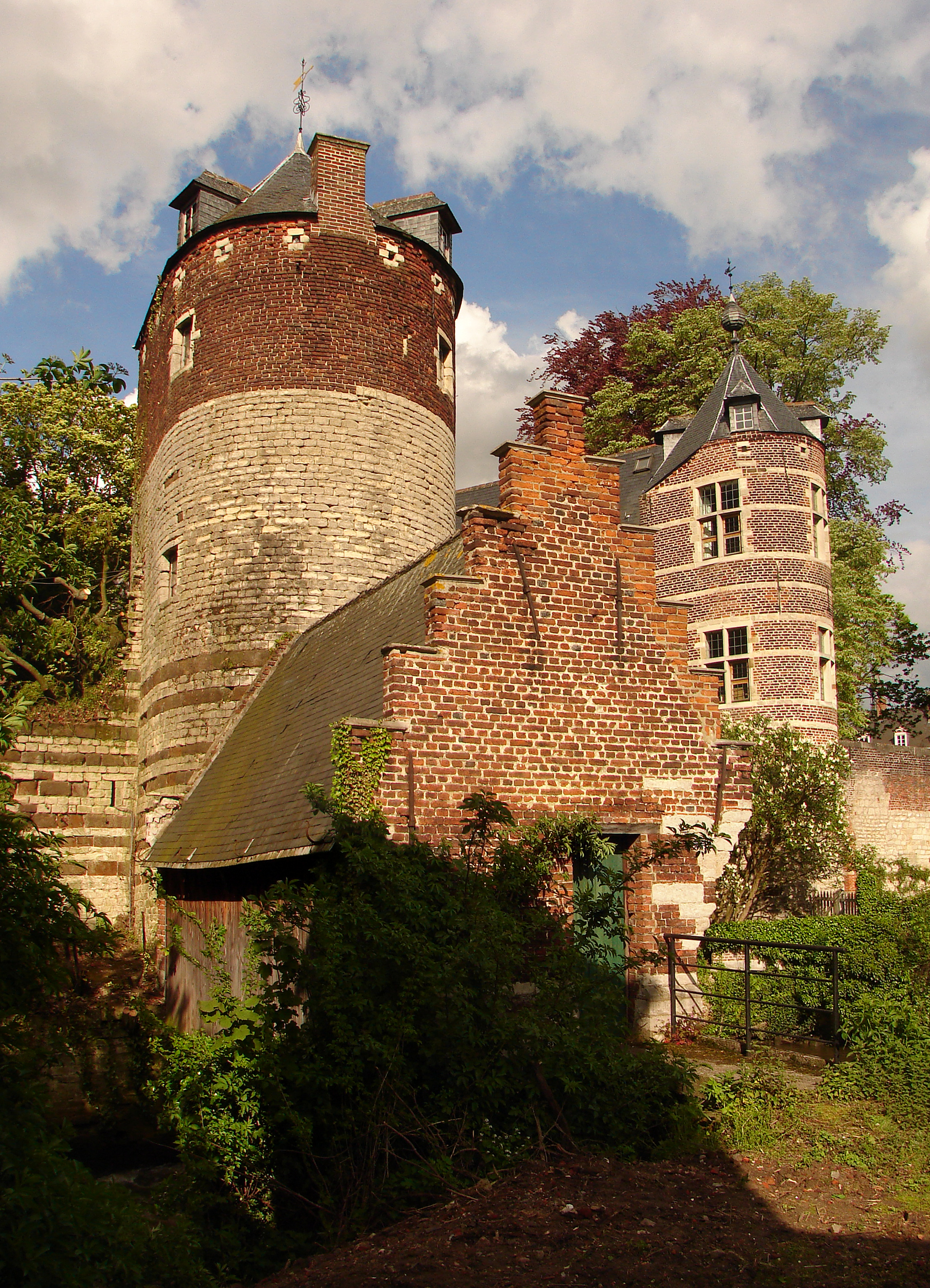 Eerste stadswal, Leuven